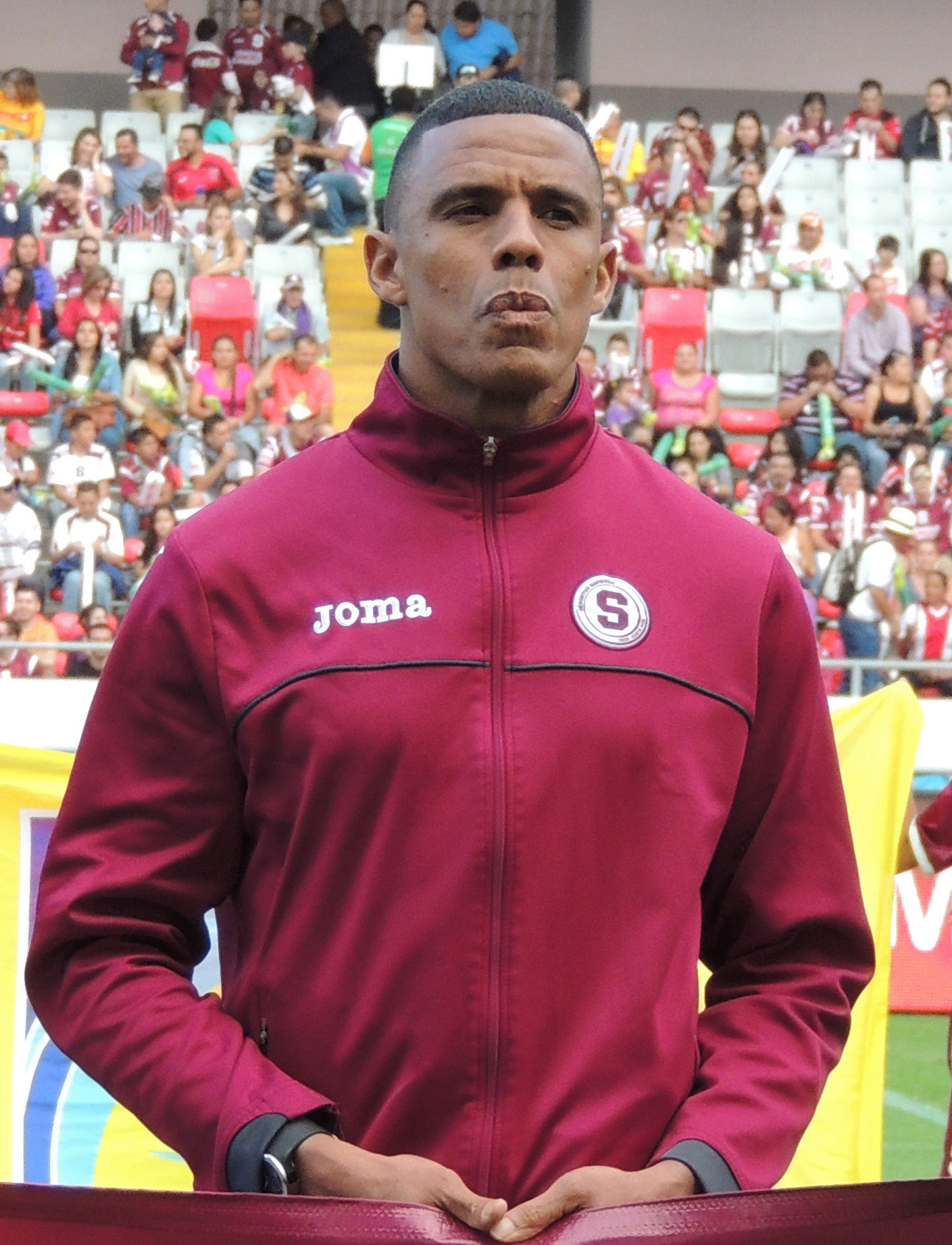 Esta obra de Luis Manuel Madrigal está bajo una licencia de Creative Commons Reconocimiento-CompartirIgual 4.0 Internacional. Para una versión sin logo escriba a